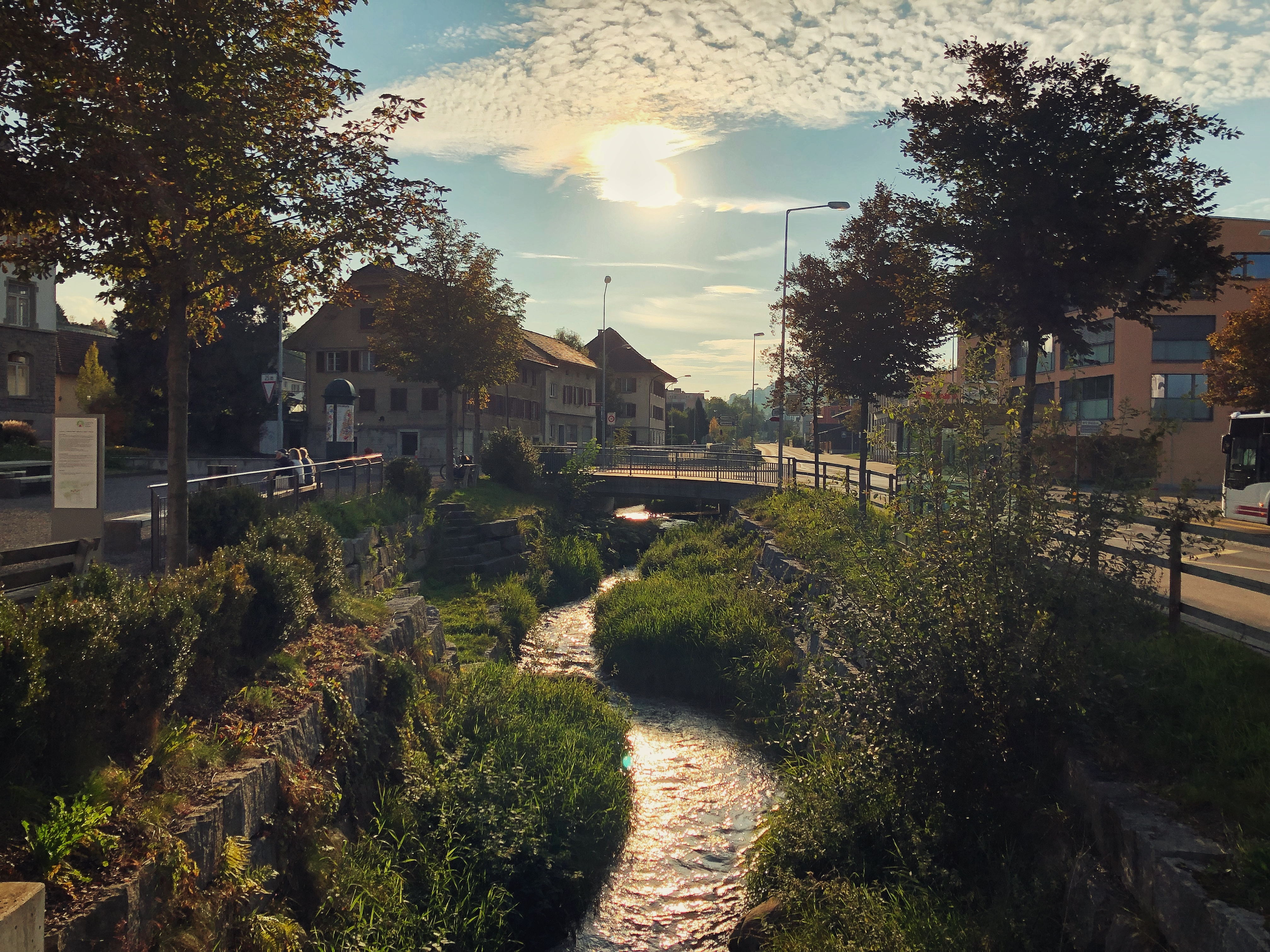 Änziwigger-Bächli bei der Heiligblut Kirche Willisau